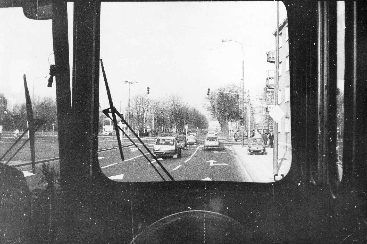 Ikarus linii 82 w Poznaniu. Ul. Arciszewskiego. 18.11.1989r.